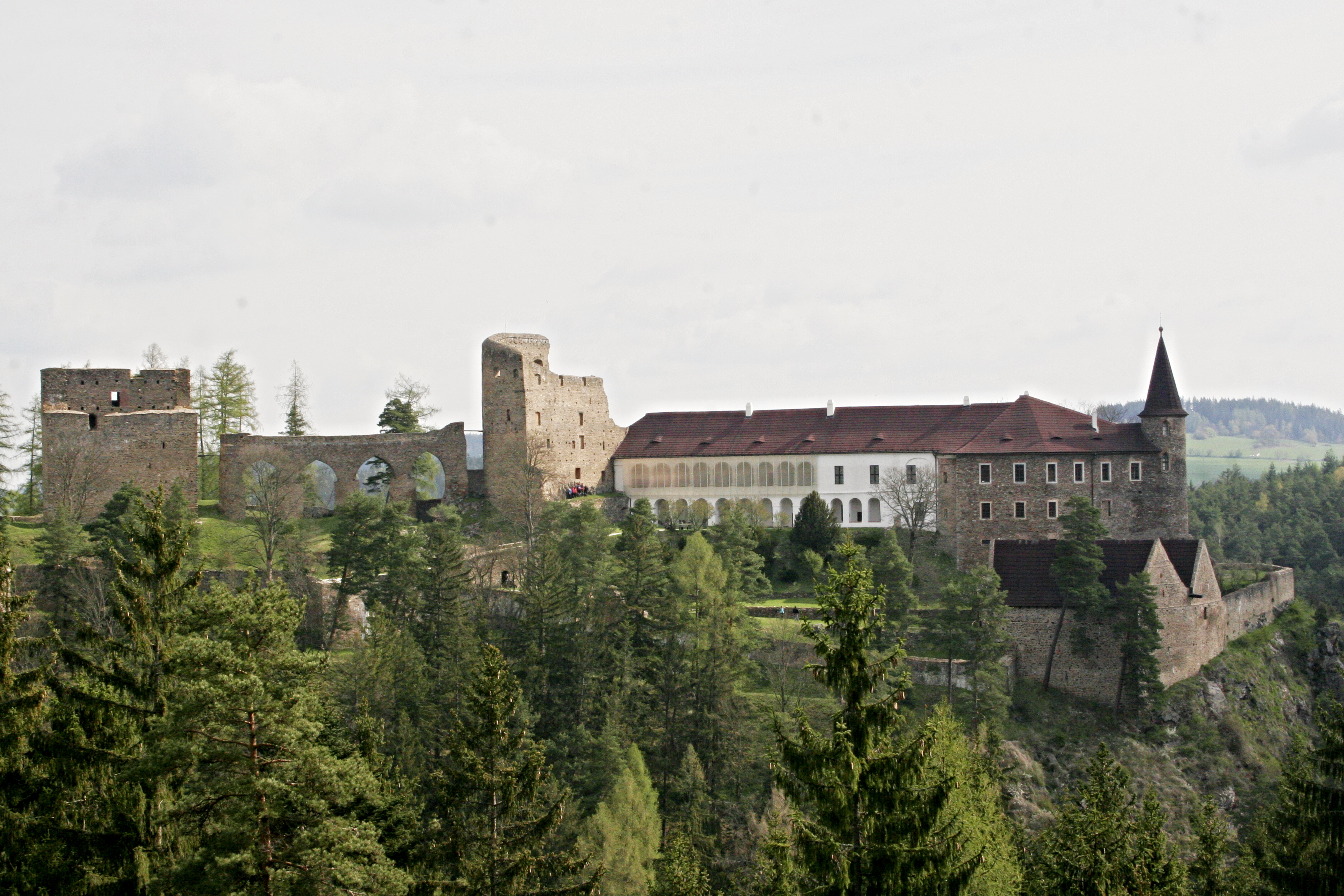 Přírodní rezervace Borek u Velhartic. Okres Klatovy, Česká republika.